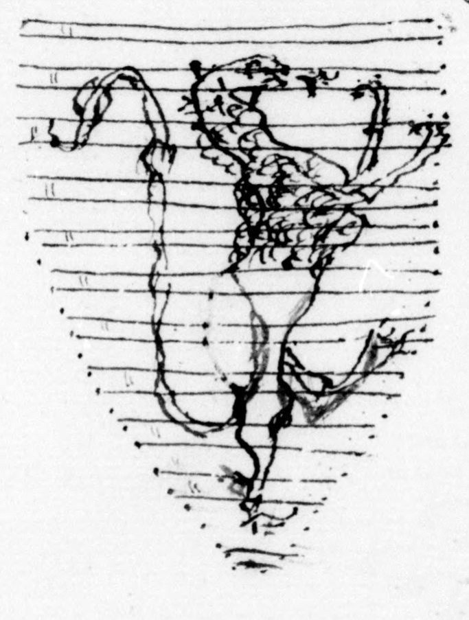 Sceau de Geoffroy II de Lusignan reproduit par Jean Besly. Ce sceau est visible sur la lettre d'hommage à Alphonse de Poitiers rédigée par Geoffroy II à Vincennes en avril 1243.